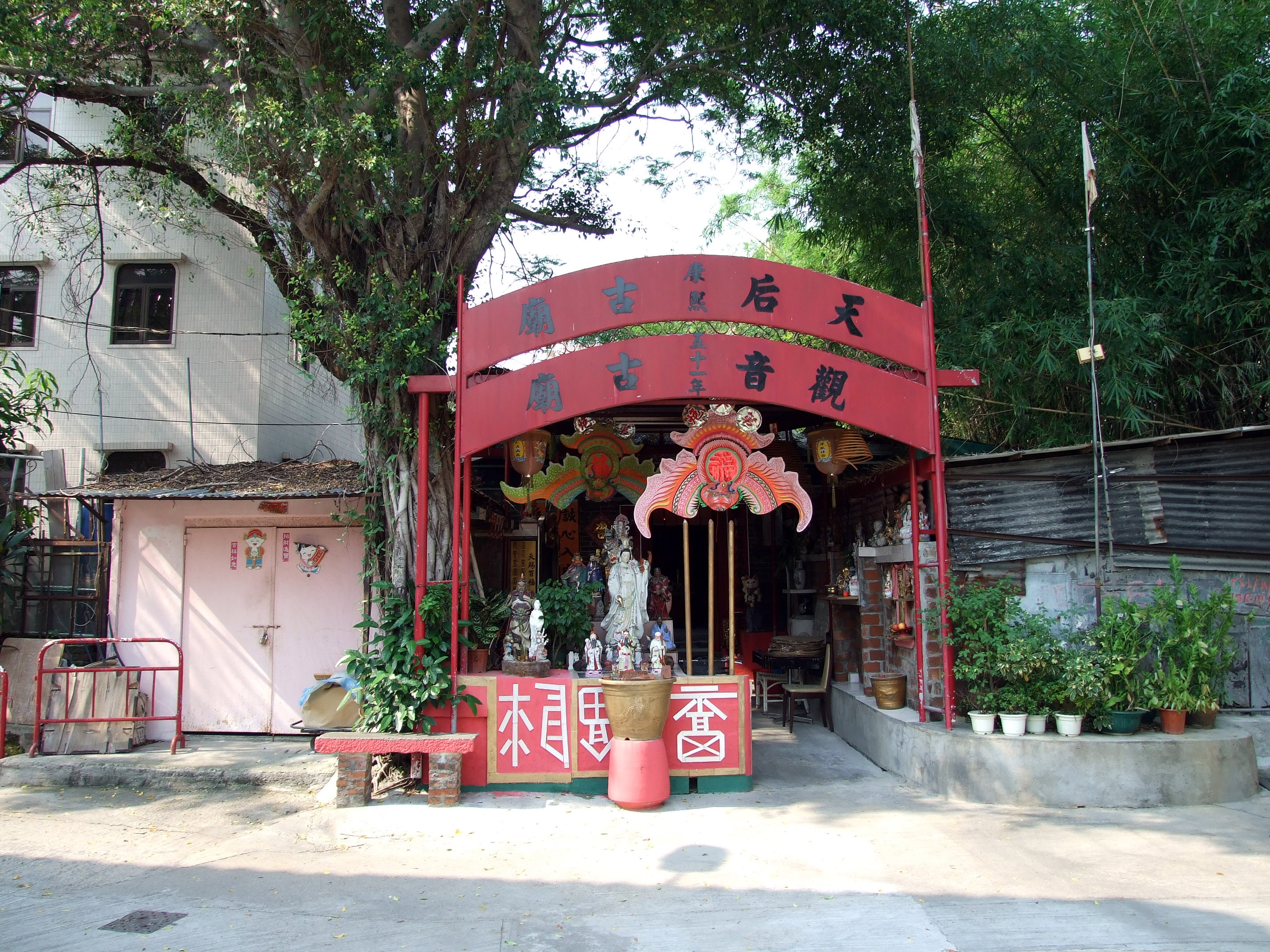 中文（香港）: 東頭圍天后古廟